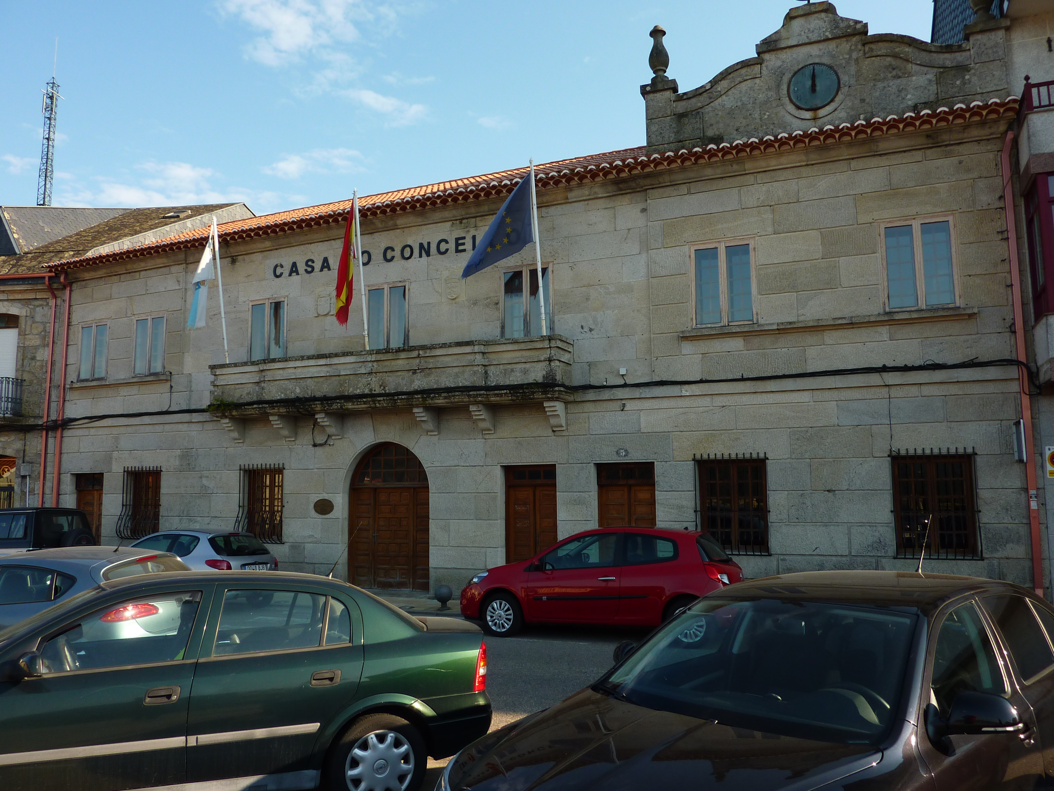 Foto del ayuntamiento de Crecente